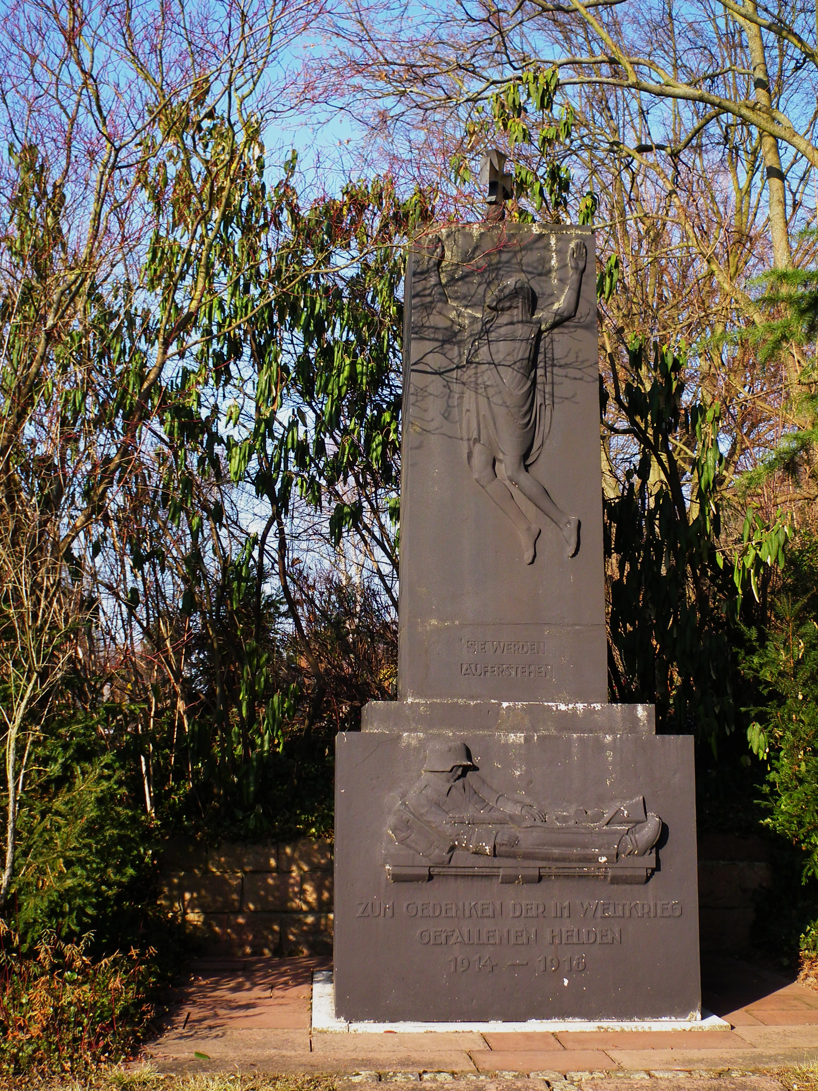 Denkmal auf dem Friedhof in Dossenheim (Baden-Württemberg, Deutschland)